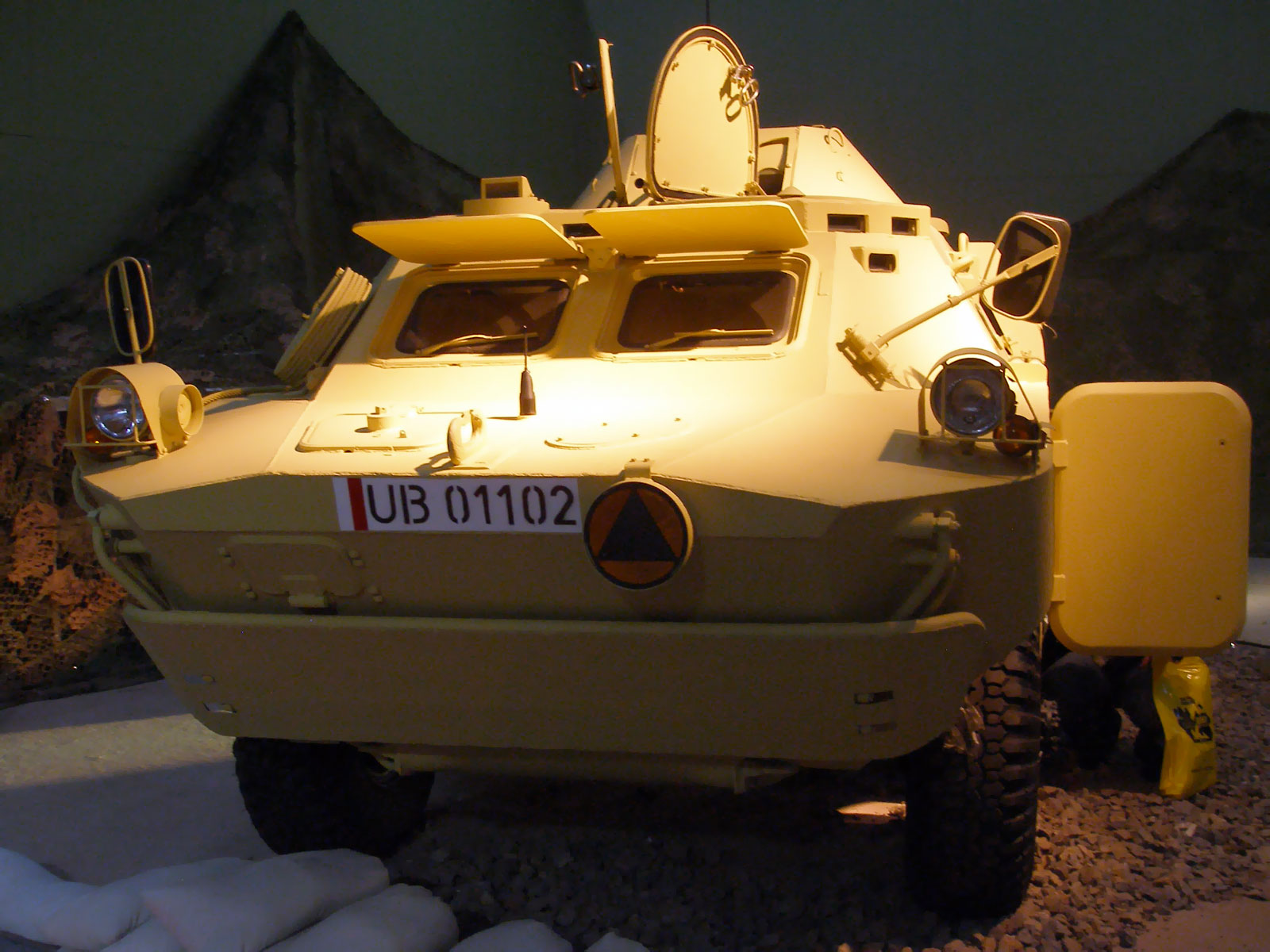 Polish BRDM-2M96iK "Szakal"